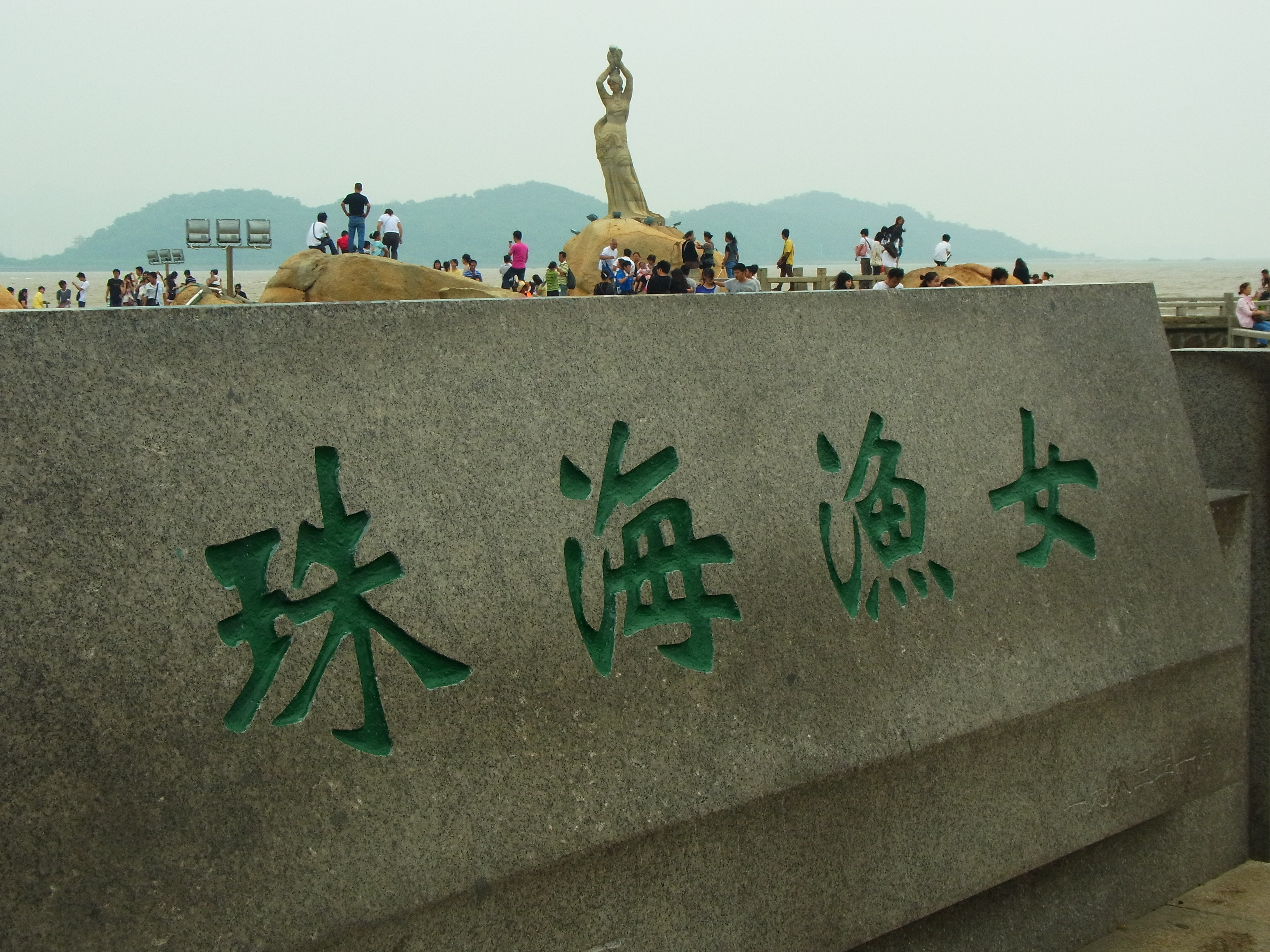 中文（香港）: 珠海渔女